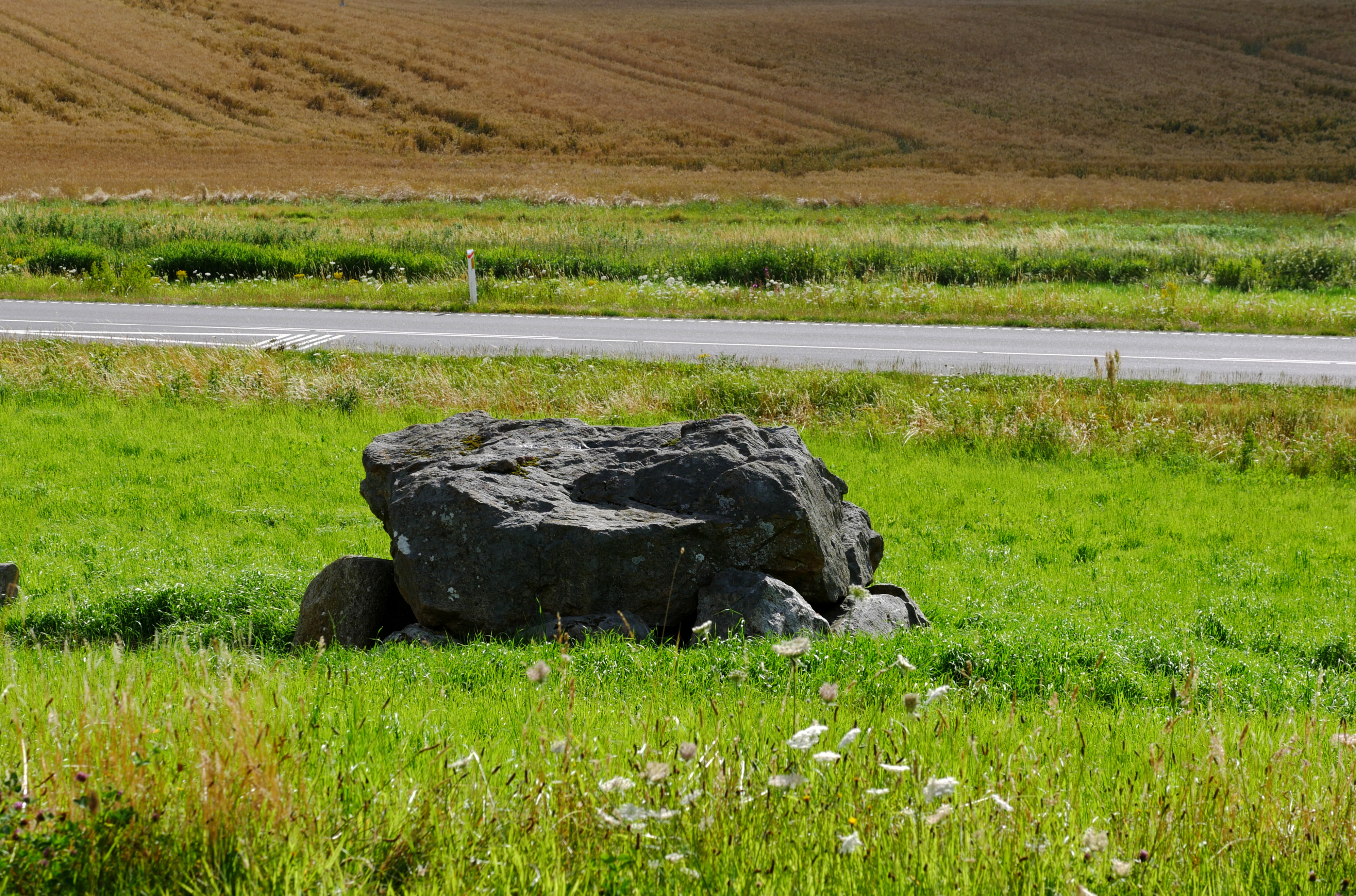 Runddysse von Strårup (auch Straarup genannt) liegt im Weiler Dalby in der Hedensted Kommune, bei Kolding in der Region Syddanmark, in Jütland in Dänemark. Der Dolmen stammt aus der Jungsteinzeit etwa 3500–2800 v. Chr. und ist eine Megalithanlage der Trichterbecherkultur (TBK).